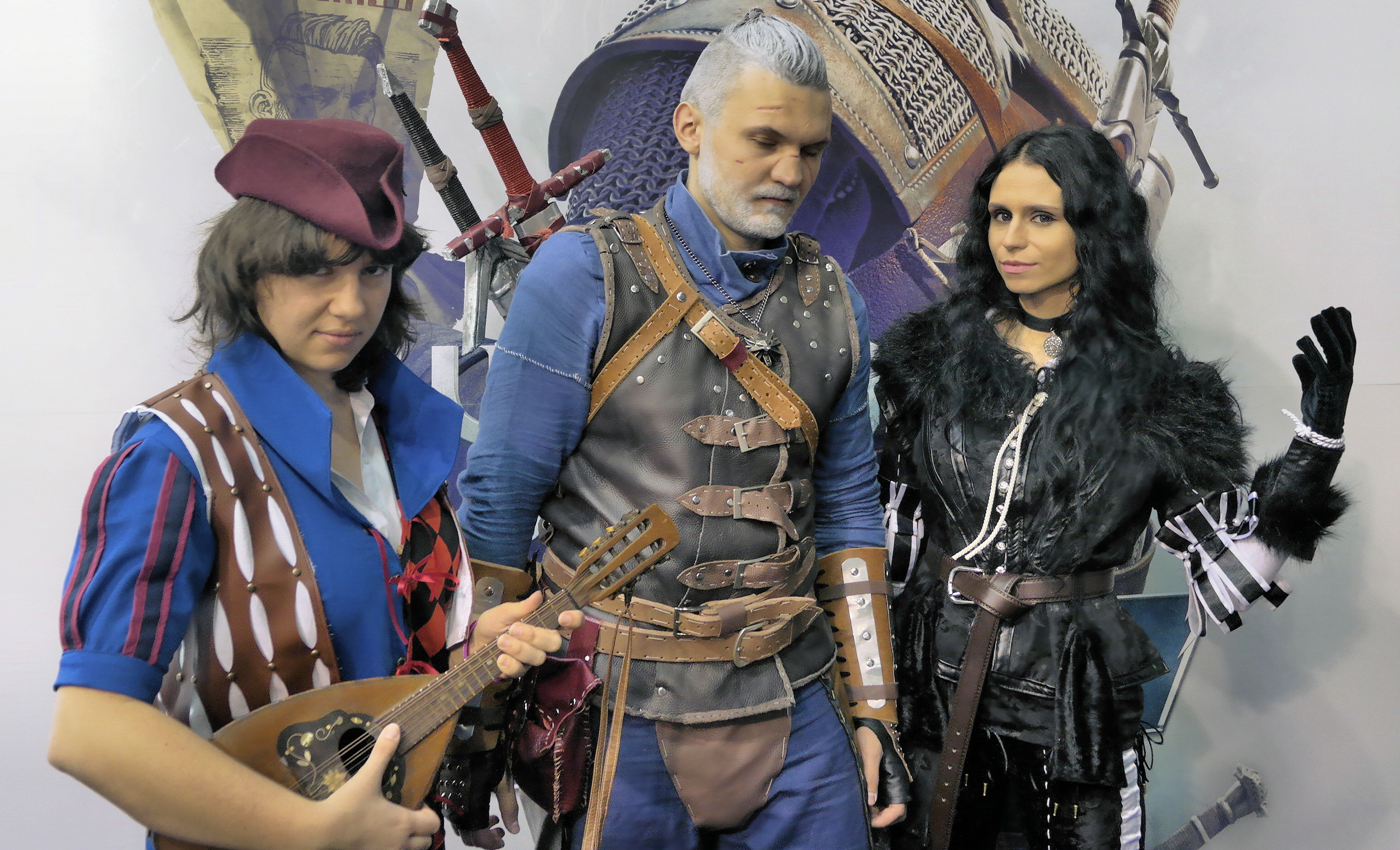 Ekspozycja na targach Poznań Game Arena 2015